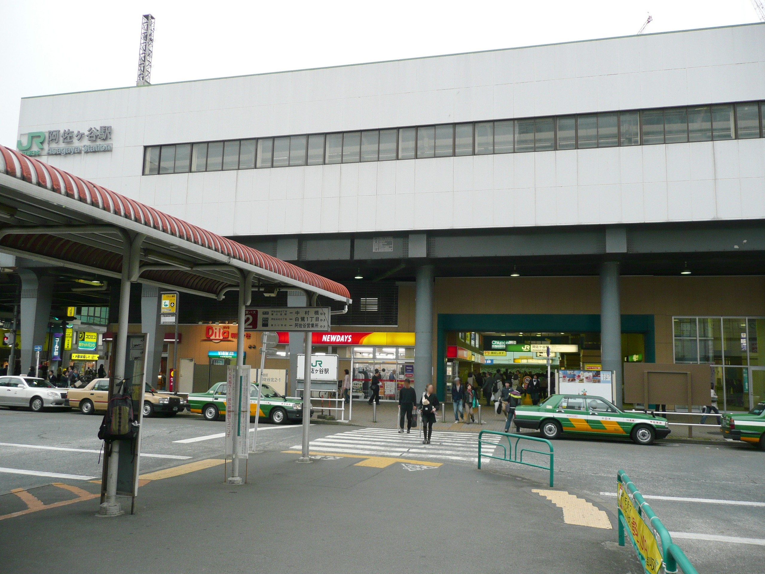 阿佐ヶ谷駅北口